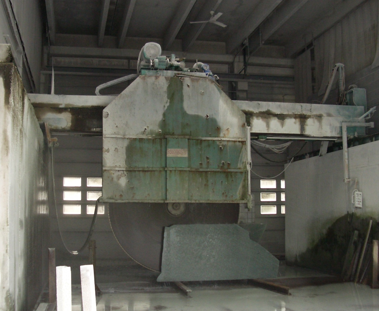 Andeer GR, Switzerland